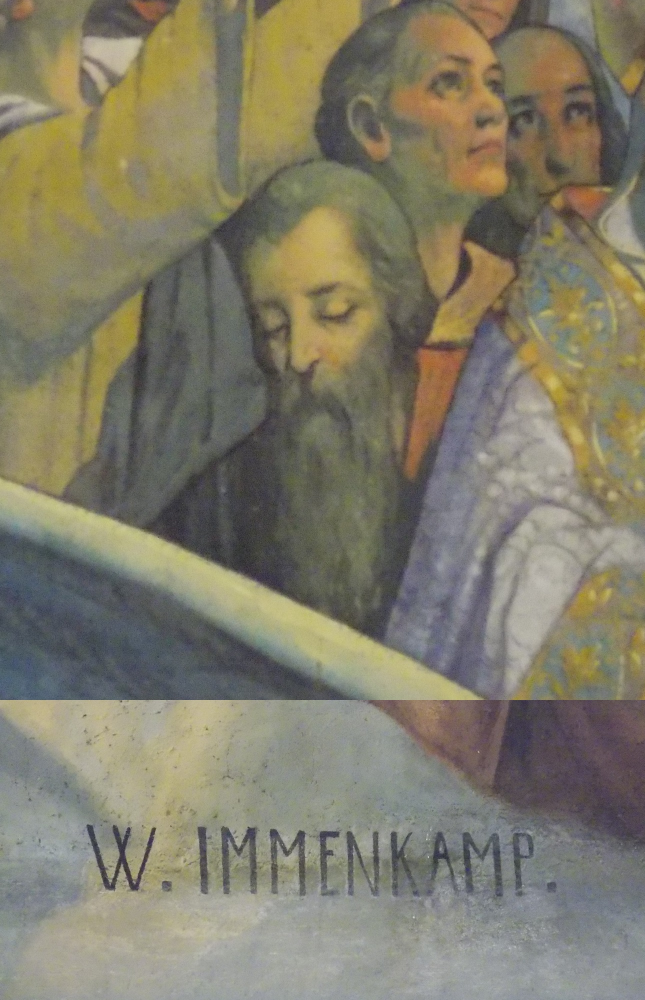 Composición con el autorretrato y la firma que el pintor Wilhelm Immenkamp incluyó en los lados izquierdo y derecho, respectivamente, de la pintura del Triunfo de los Justos en la actual Basílica del Sagrado Corazón de Jesús de Gijón.